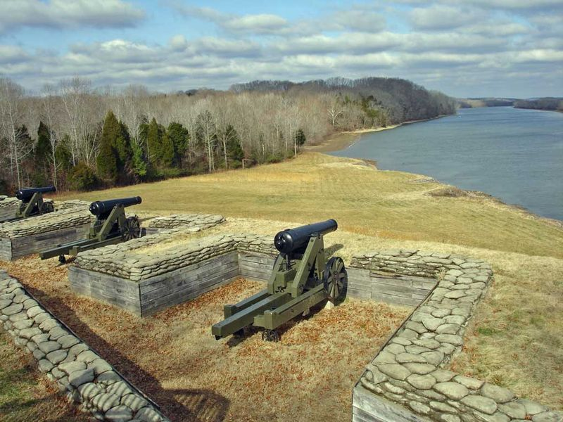 Flodbatteriet ved Fort Donelson